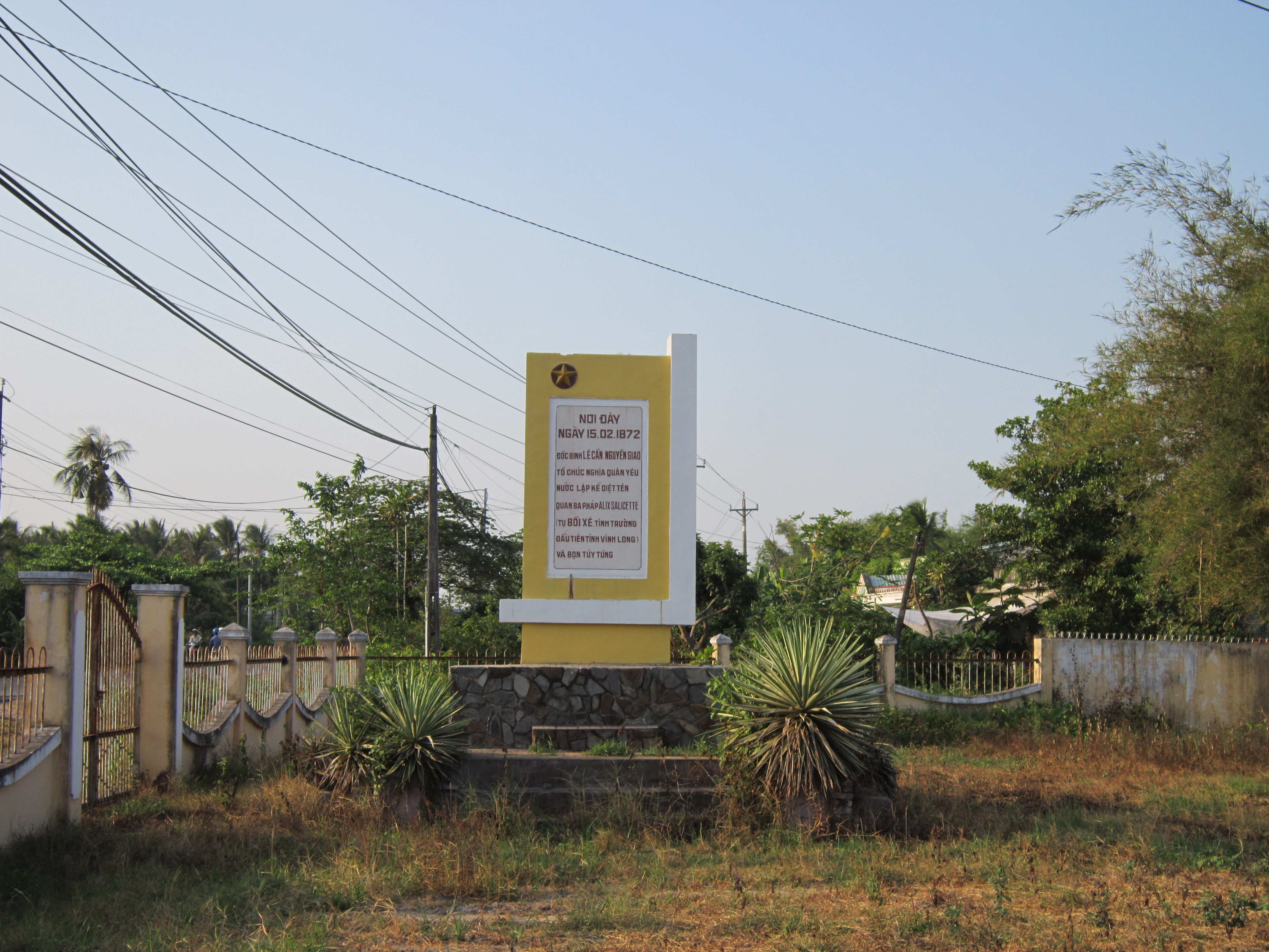 Bia ghi công Lê Cẩn và Nguyễn Giao tại xã Trung Ngãi, huyện Vũng Liêm, tỉnh Vĩnh Long, Việt Nam.